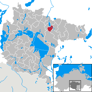 Schloen im Landkreis Müritz, Mecklenburg-Vorpommern